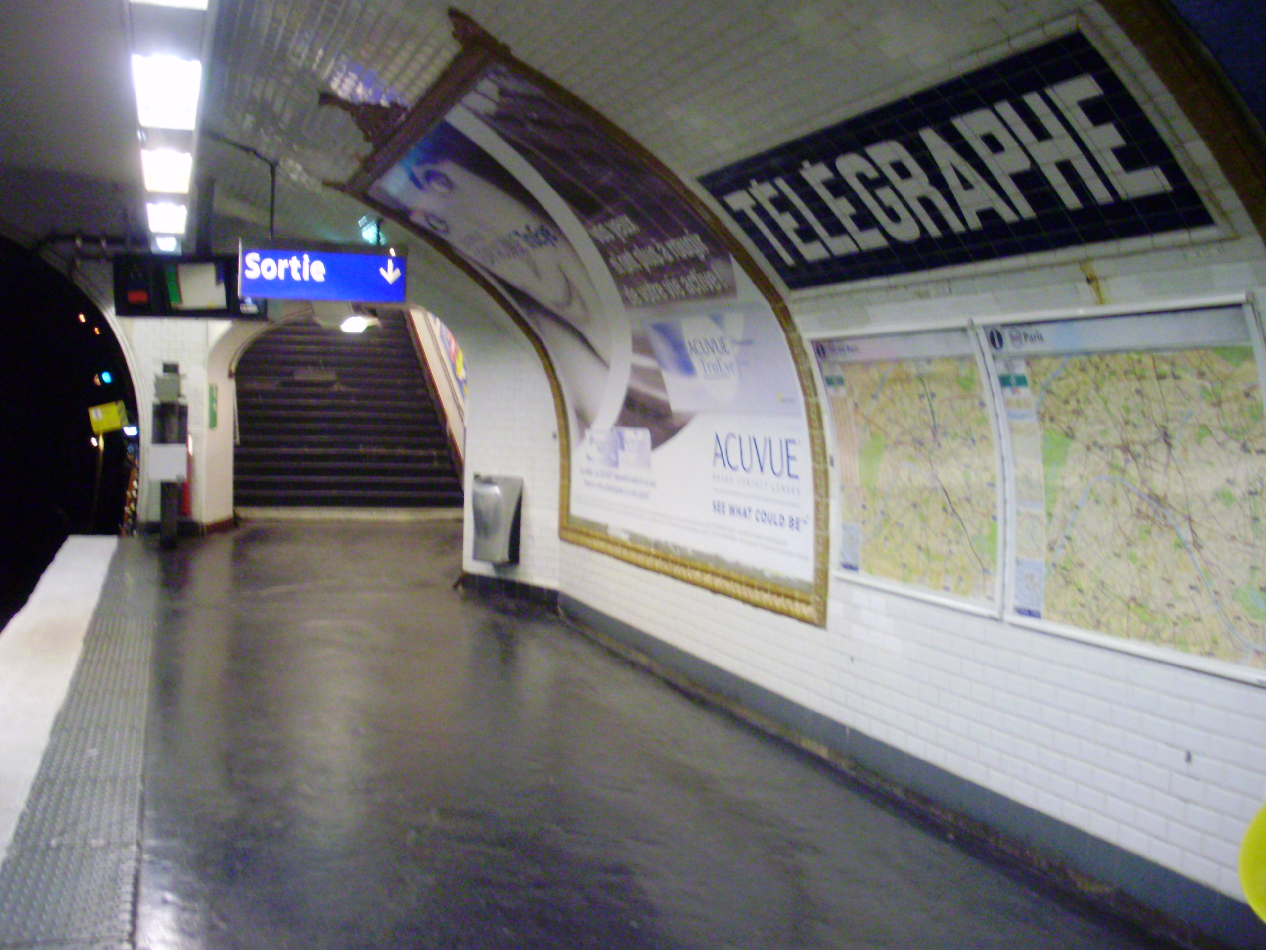 Sortie sur le quai en direction de Mairie des Lilas de la station « Télégraphe » du métro de Paris